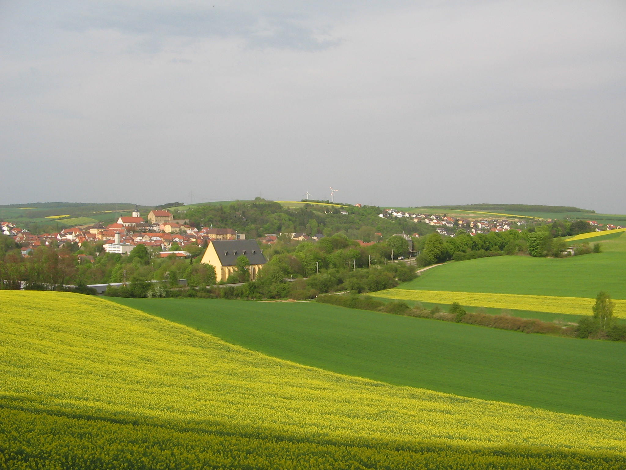 Beschreibung: Sanfte Hügellandschaft um Arnstein mit Blick auf Maria Sondheim Quelle: selbst fotografiert Autor: Björn Reusch Datum: 02.05.05